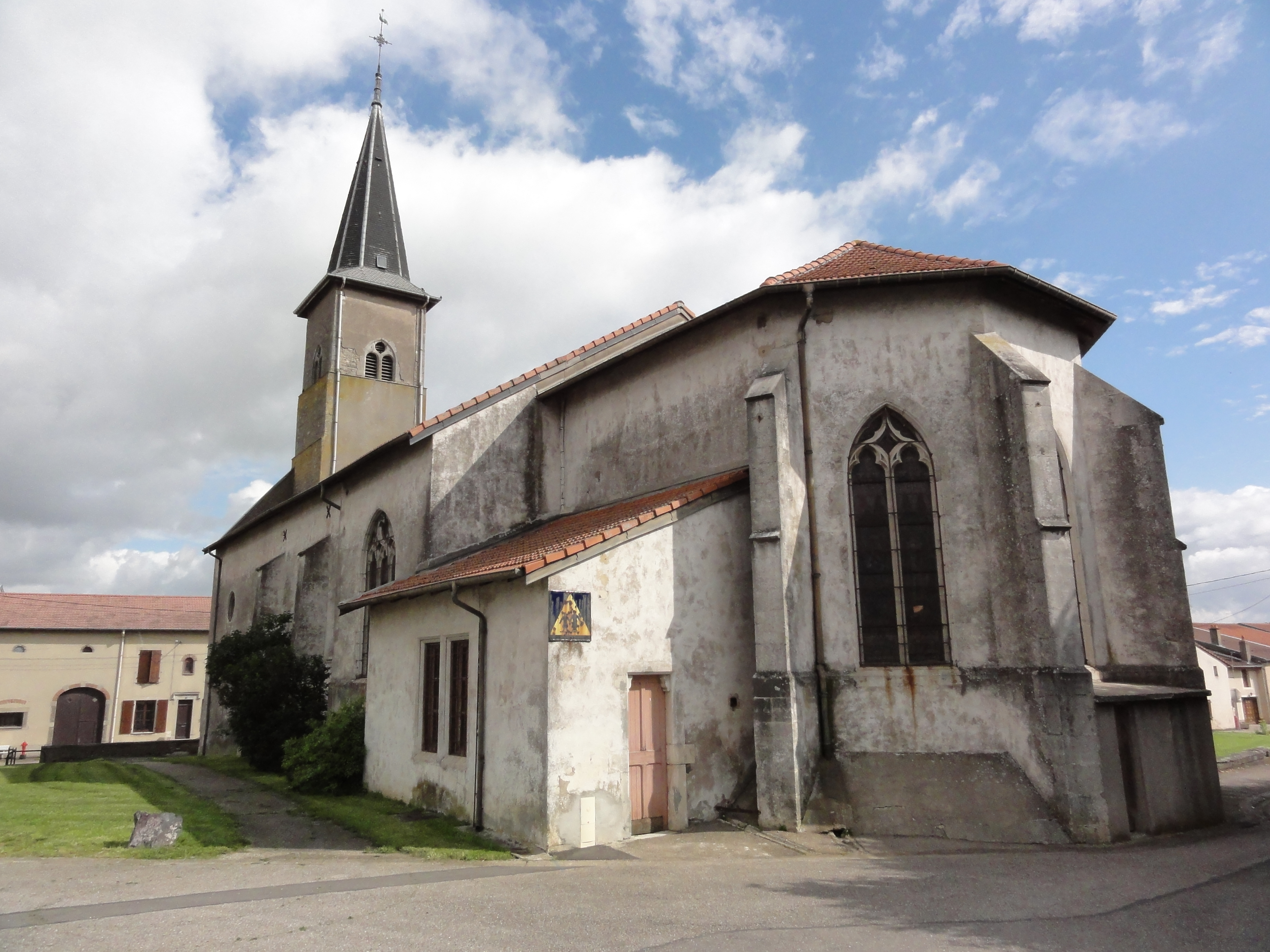 Haraucourt (M-et-M) église